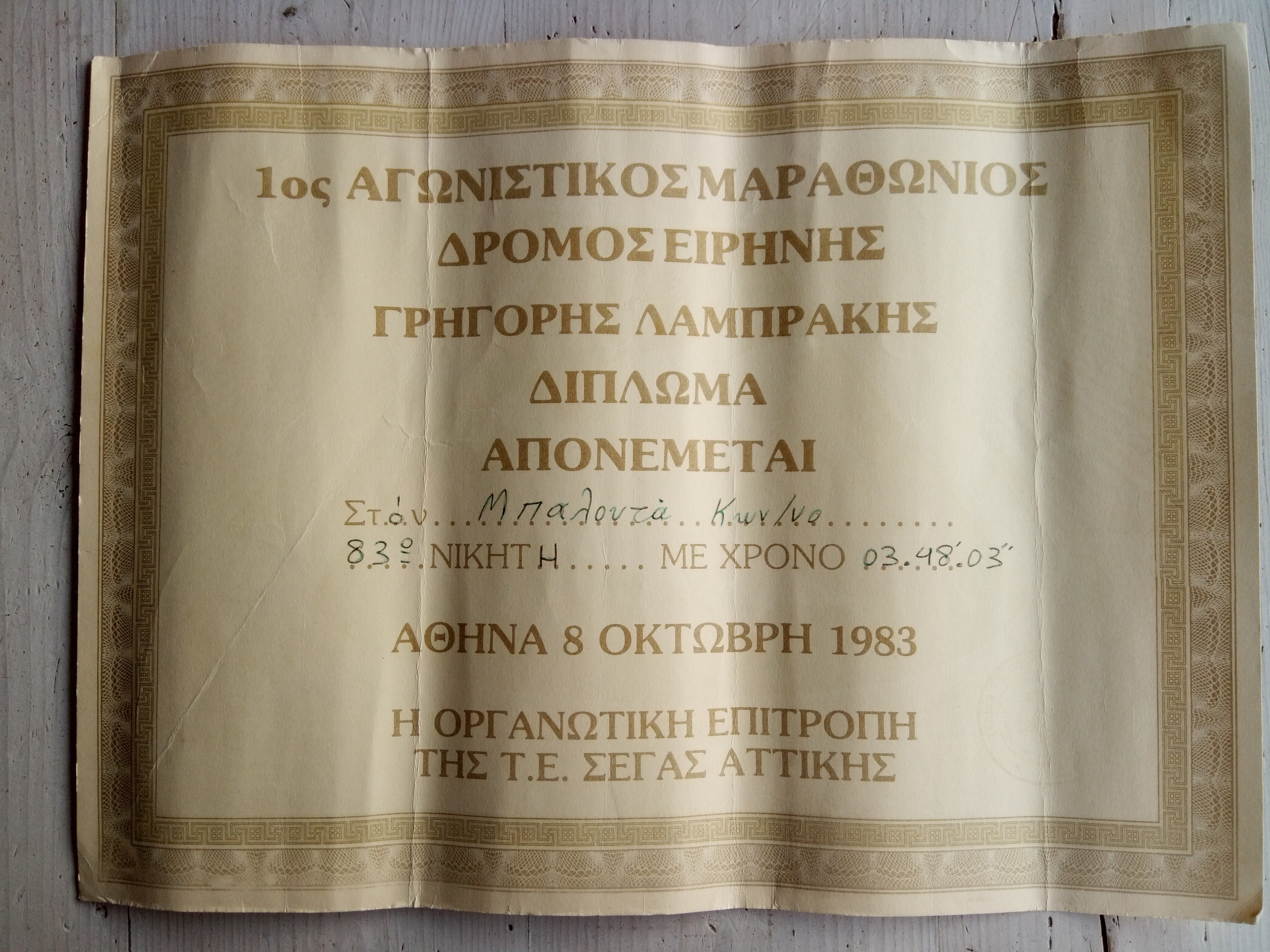 φωτό